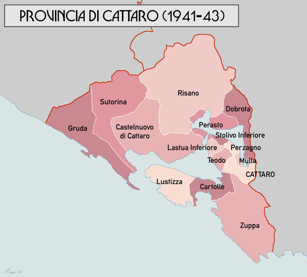 Mappa della Provincia Italiana di Cattaro (1941-43). Dati di origine: Volkstumskarte von Jugoslawien, Wilfried Krallert (1941)